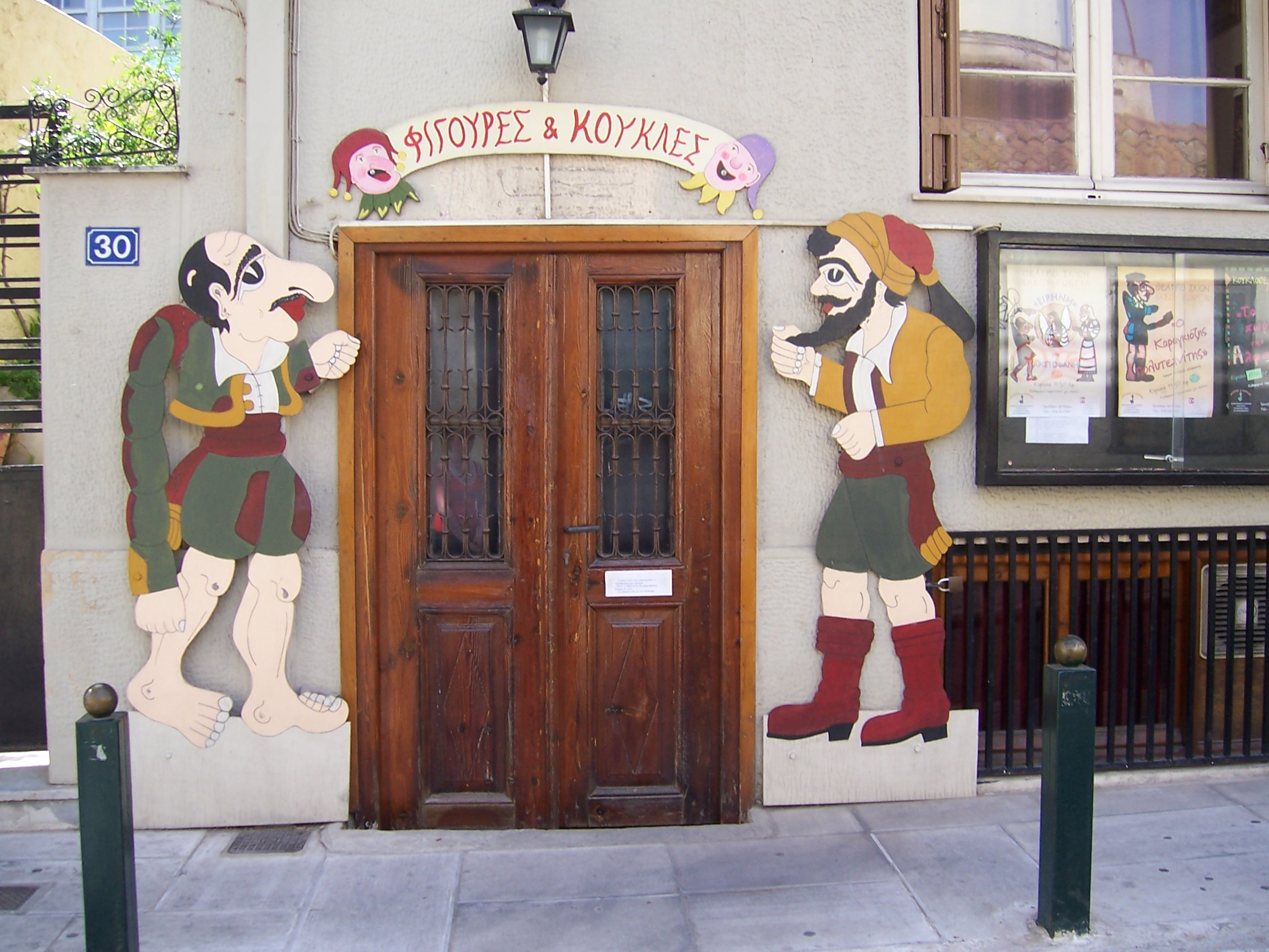 Karaghiozis. Athènes, Grèce